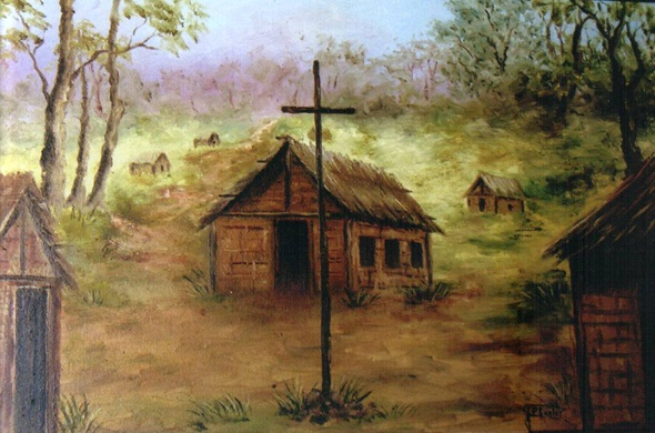 Capelinha de folhas de buriti em 1840, no local onde hoje está o Santuário Matriz - Neste local, antigo Arraial do Barro Preto, iniciou a cidade de Trindade.